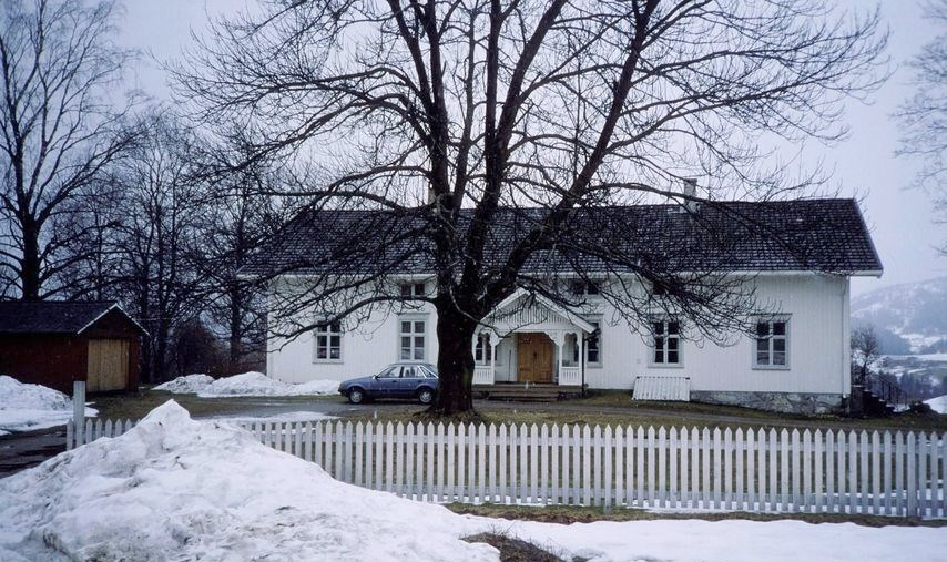 Holla prestegård. Foto: Kay M. Staaland. Fra Riksantikvarens Kulturminnesøk.